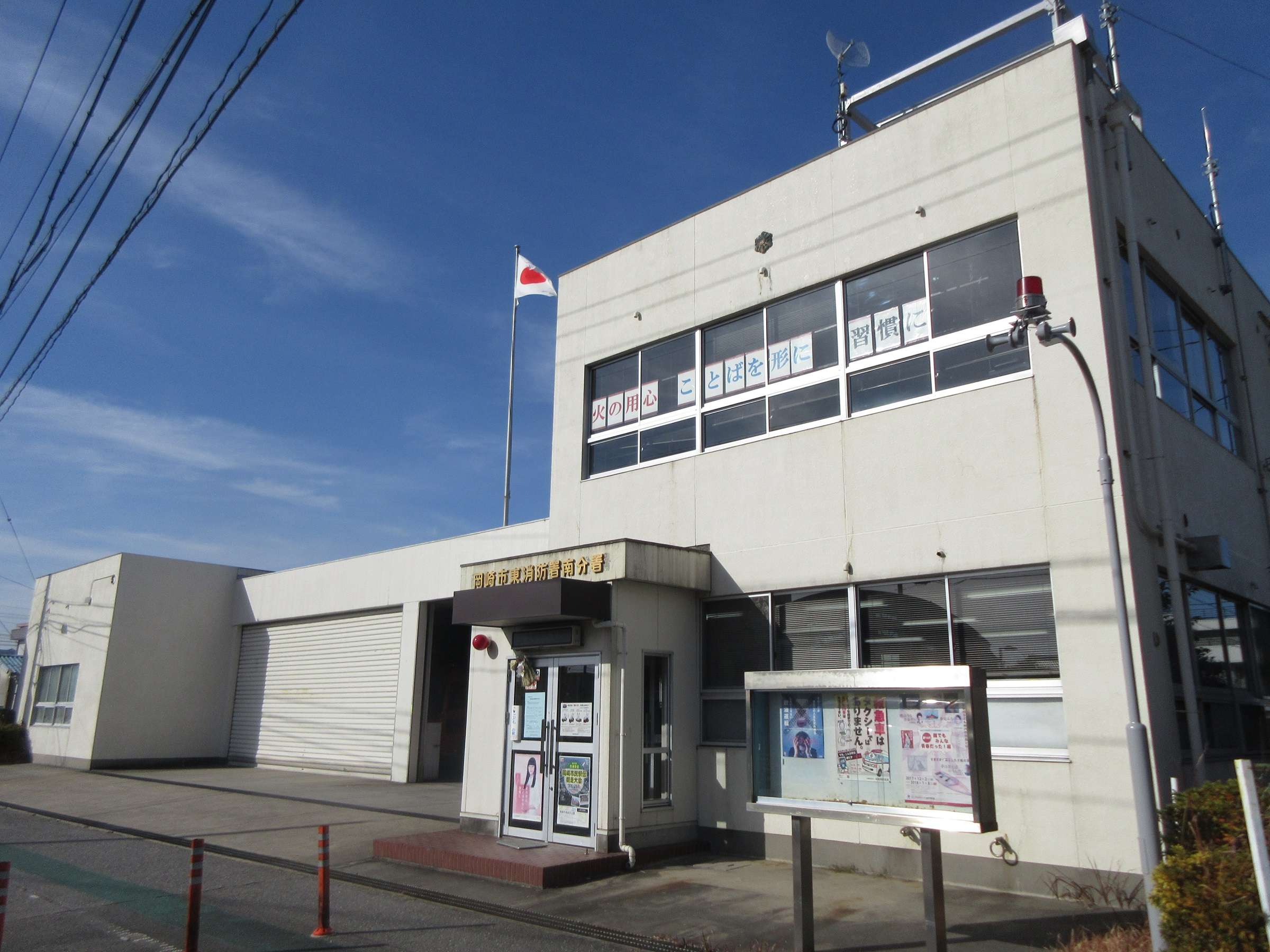 岡崎市消防本部 東消防署 南分署